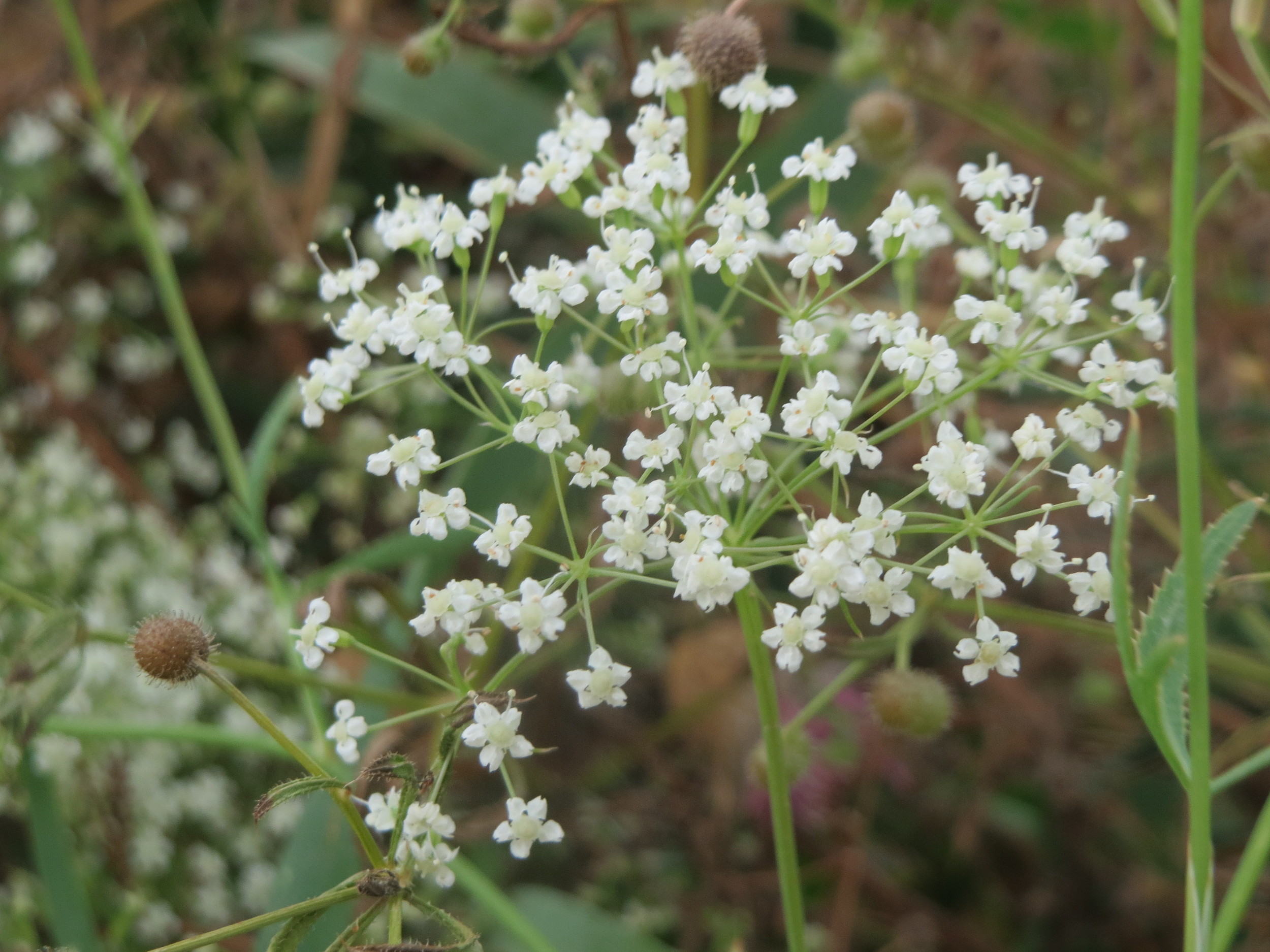 Gemeine Sichelmöhre (Falcaria vulgaris) an der Elisabethenstraße bei Wiesbaden